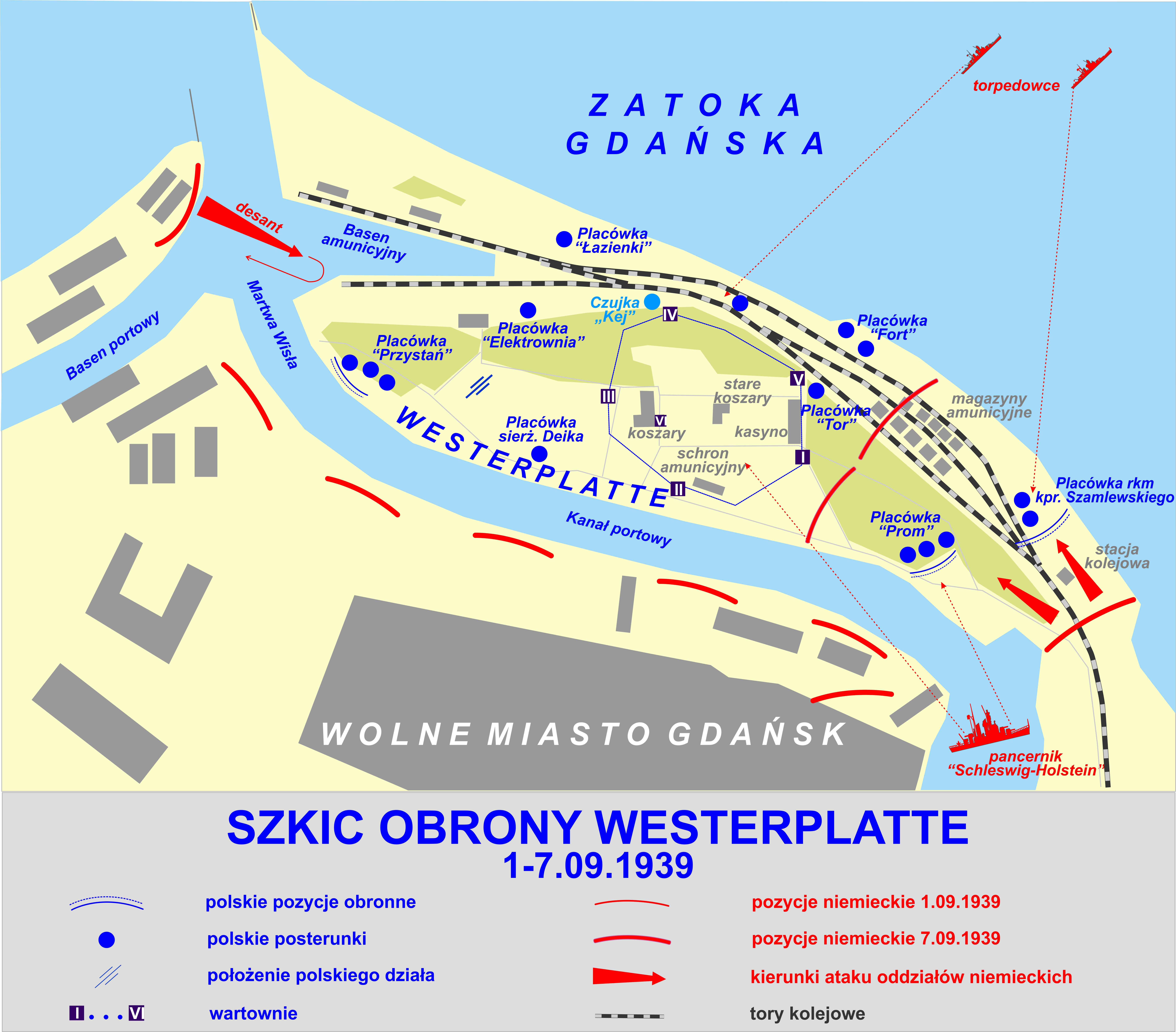 Szkic obrony Westerplatte 1 - 7.09.1939